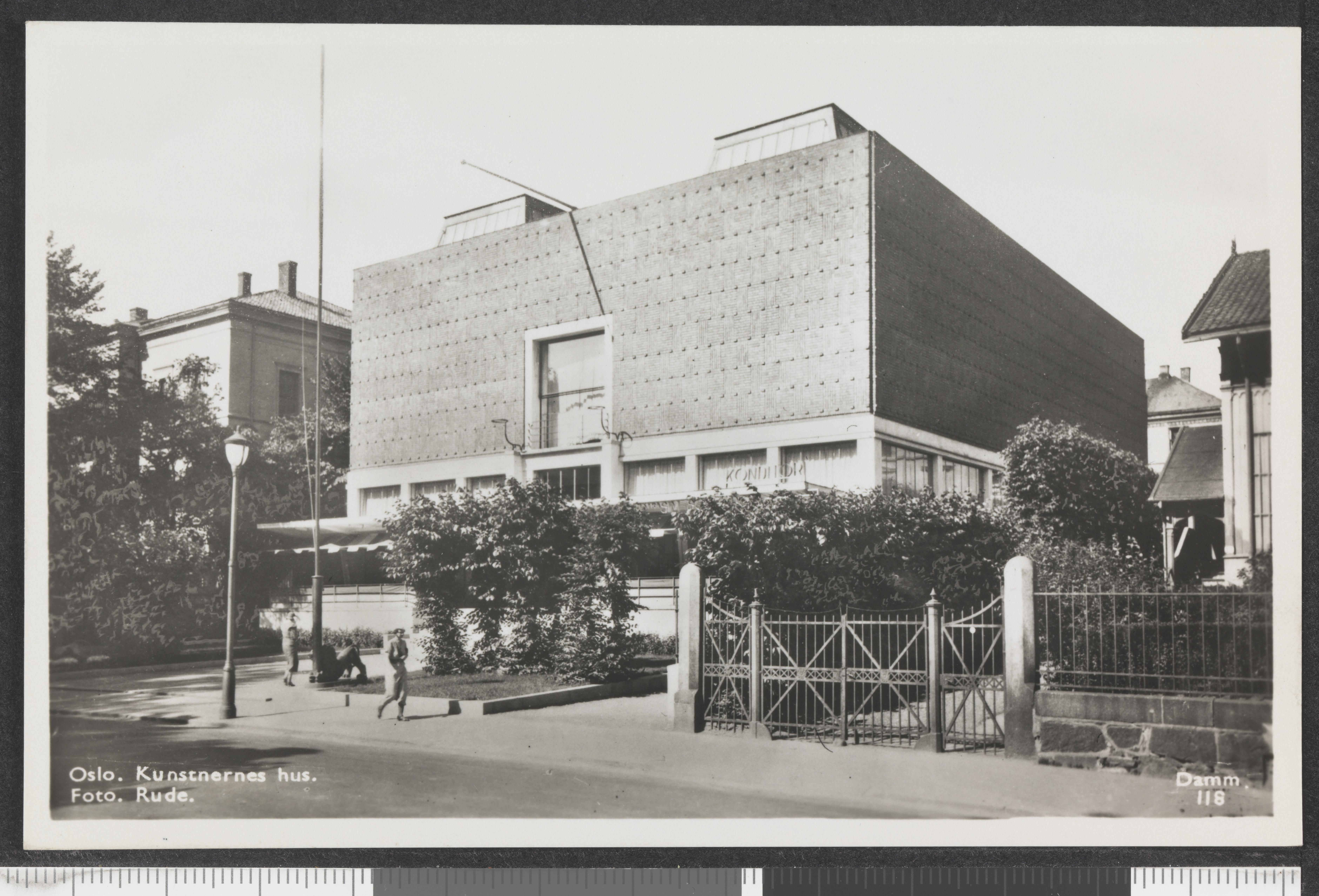 Bildet er hentet fra Nasjonalbibliotekets bildesamling Oslo, Oslo